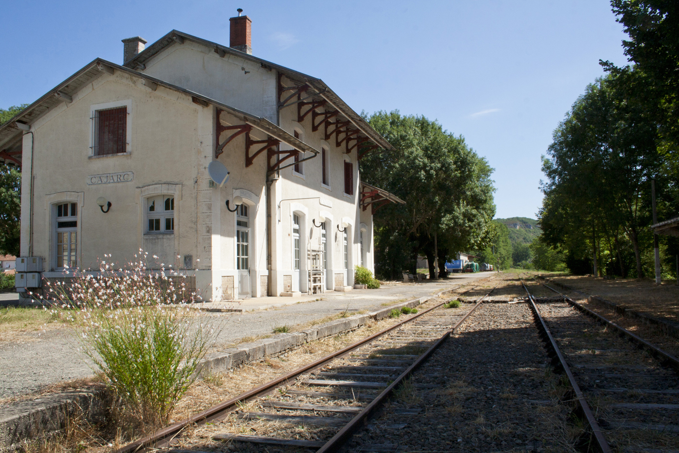 Le bâtiment principal de la gare de Cajarc dans le Lot (Midi-Pyrénées, France). .